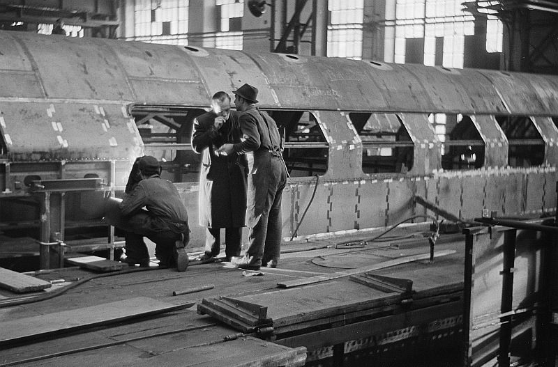 Original image description from the Deutsche Fotothek Schweißarbeiten am Grundgerüst eines Doppelstockwagens